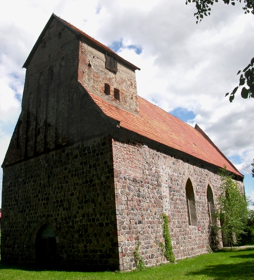 Buk - rzymskokatolicki kościół filialny p.w. św. Antoniego, 2 poł. XIII, XVI, 1848 (widok z płd.-zach. / Autor: Amber (R), 2005-06-30)